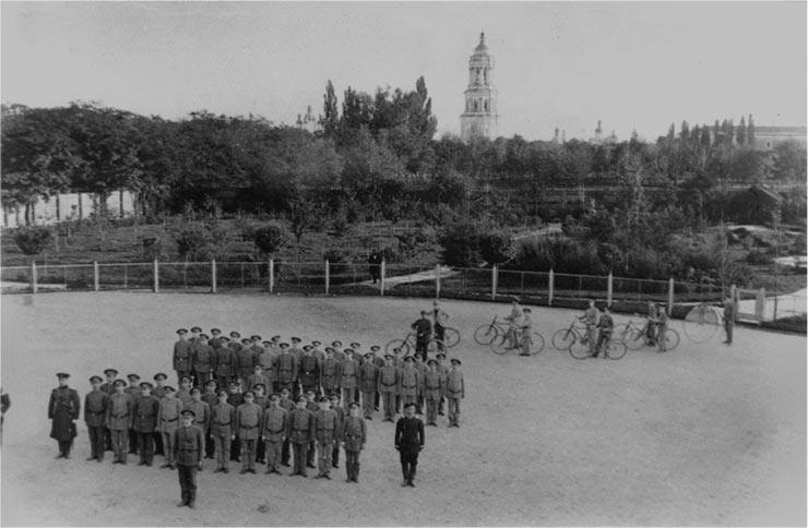 Світлина Київського іподрому з велосипедистами